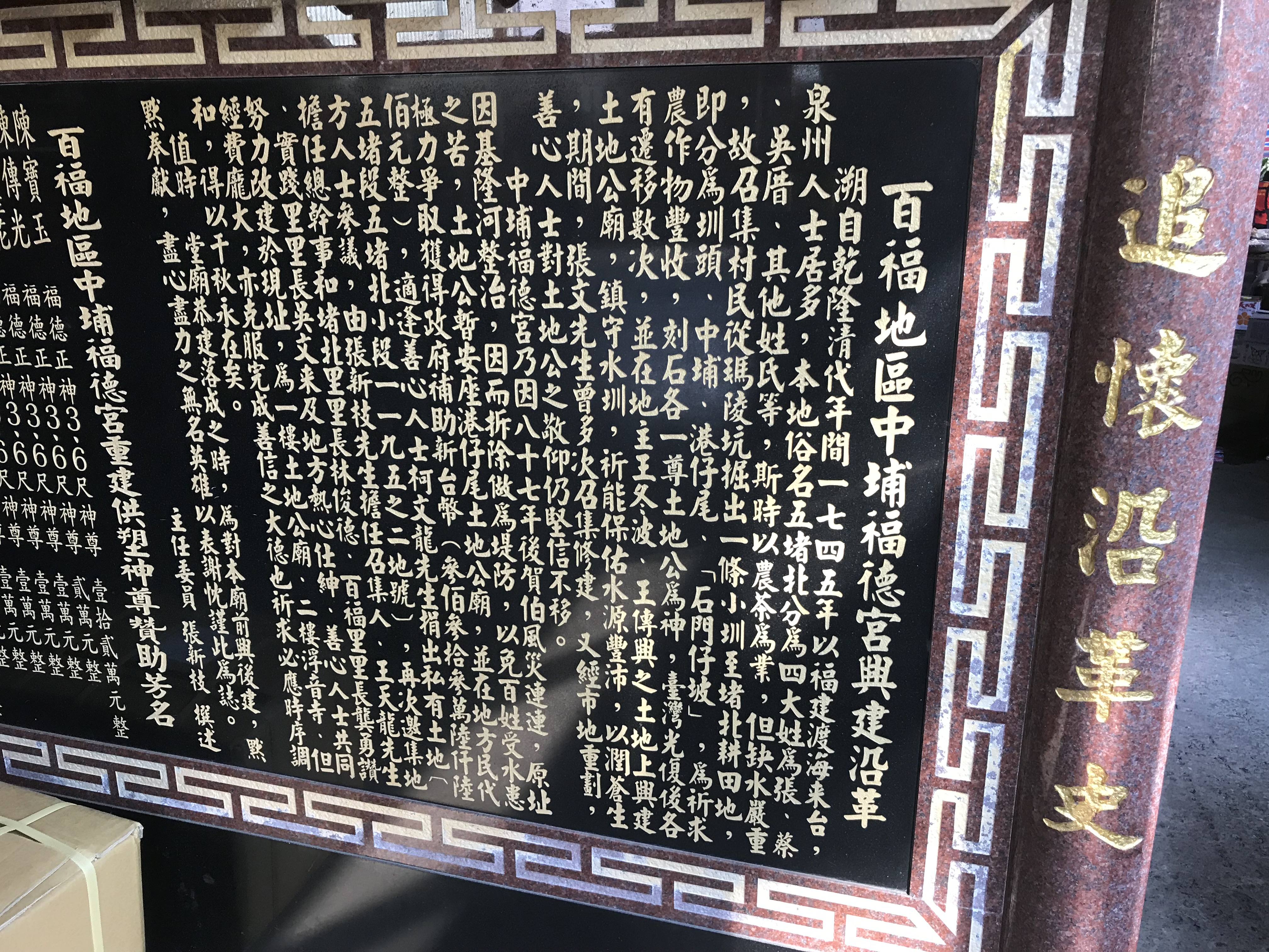 中文（台灣）: 百福地區中埔福德宮興建沿革，管理委員會主任委員張新枝撰述。